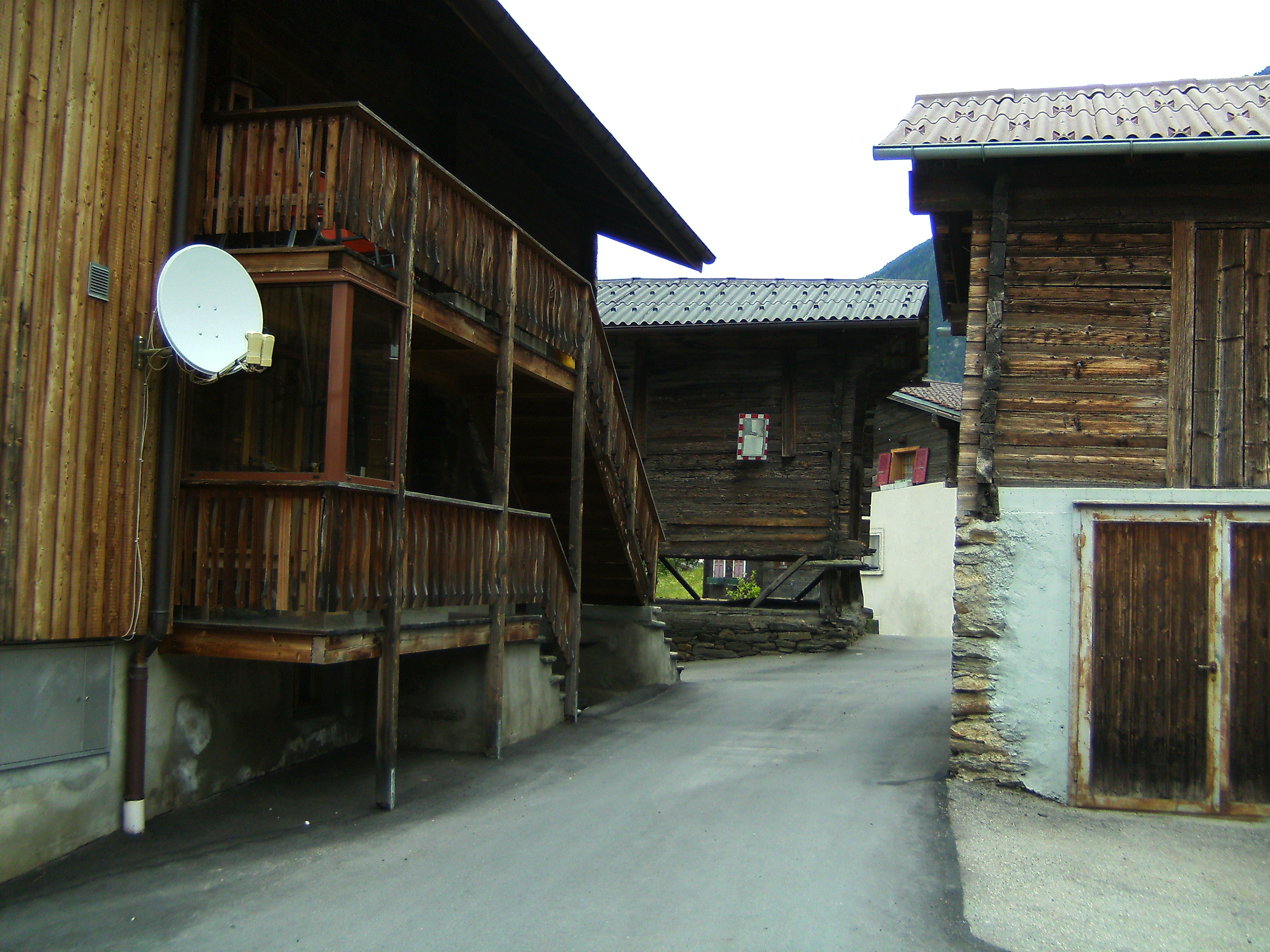 Ried-Brig im Oberwallis